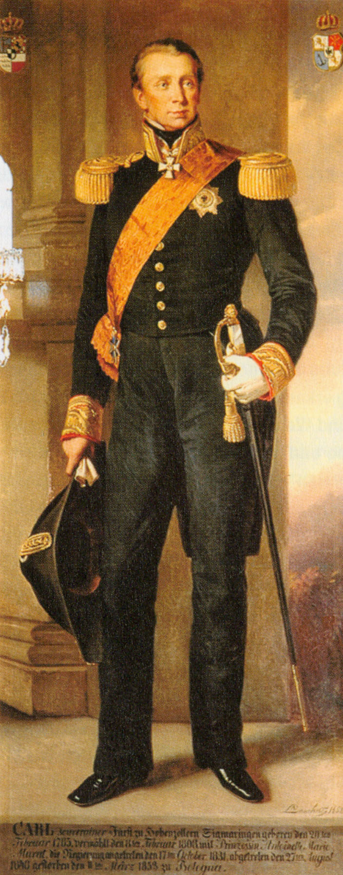 Fürst Karl von Hohenzollern-Sigmaringen (1785 – 1853, reg. 1831 – 1848) Fürstliche Hohenzollerische Sammlungen Sigmaringen